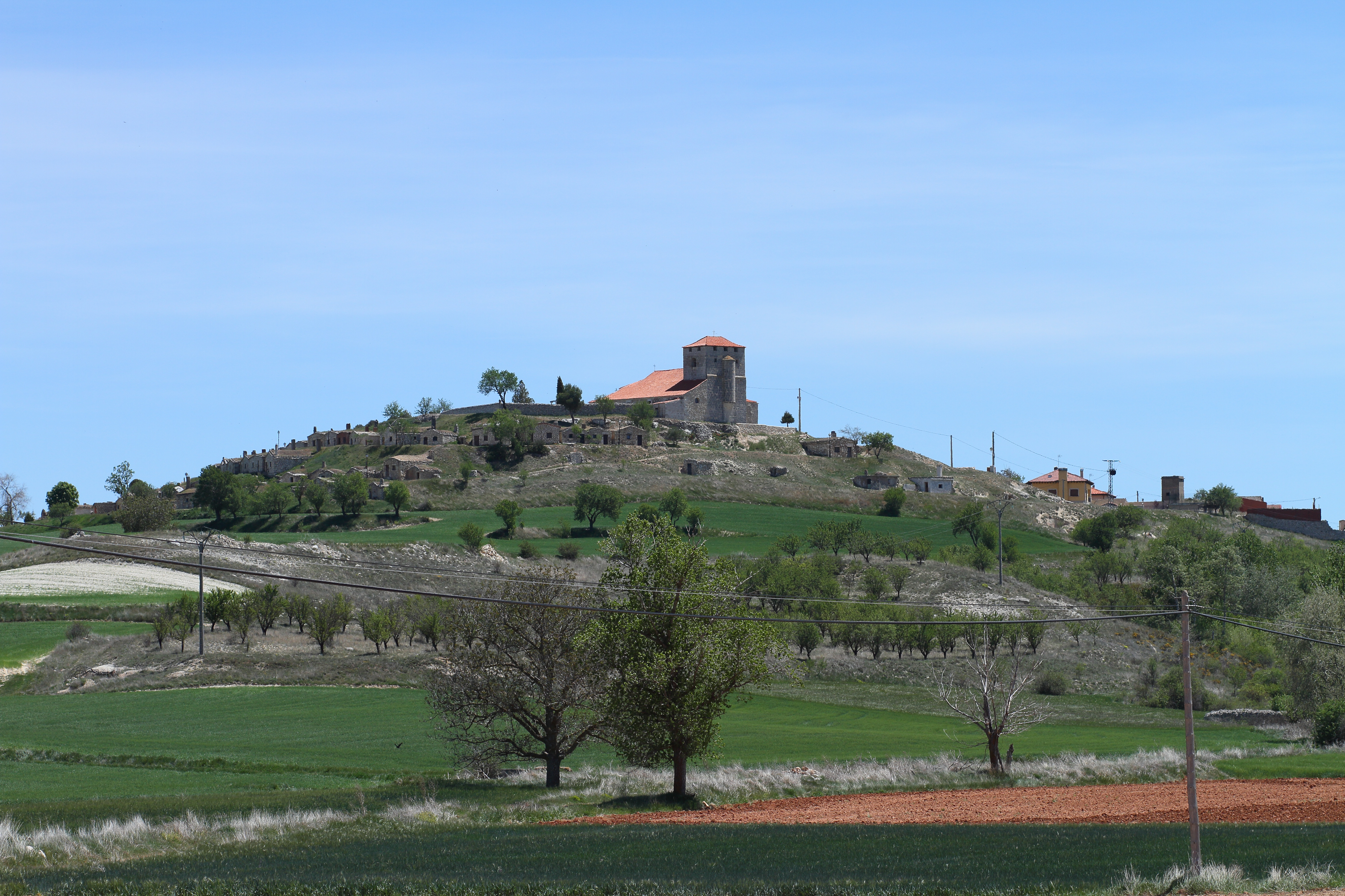 Moradillo de Roa, 02, desde BU-202